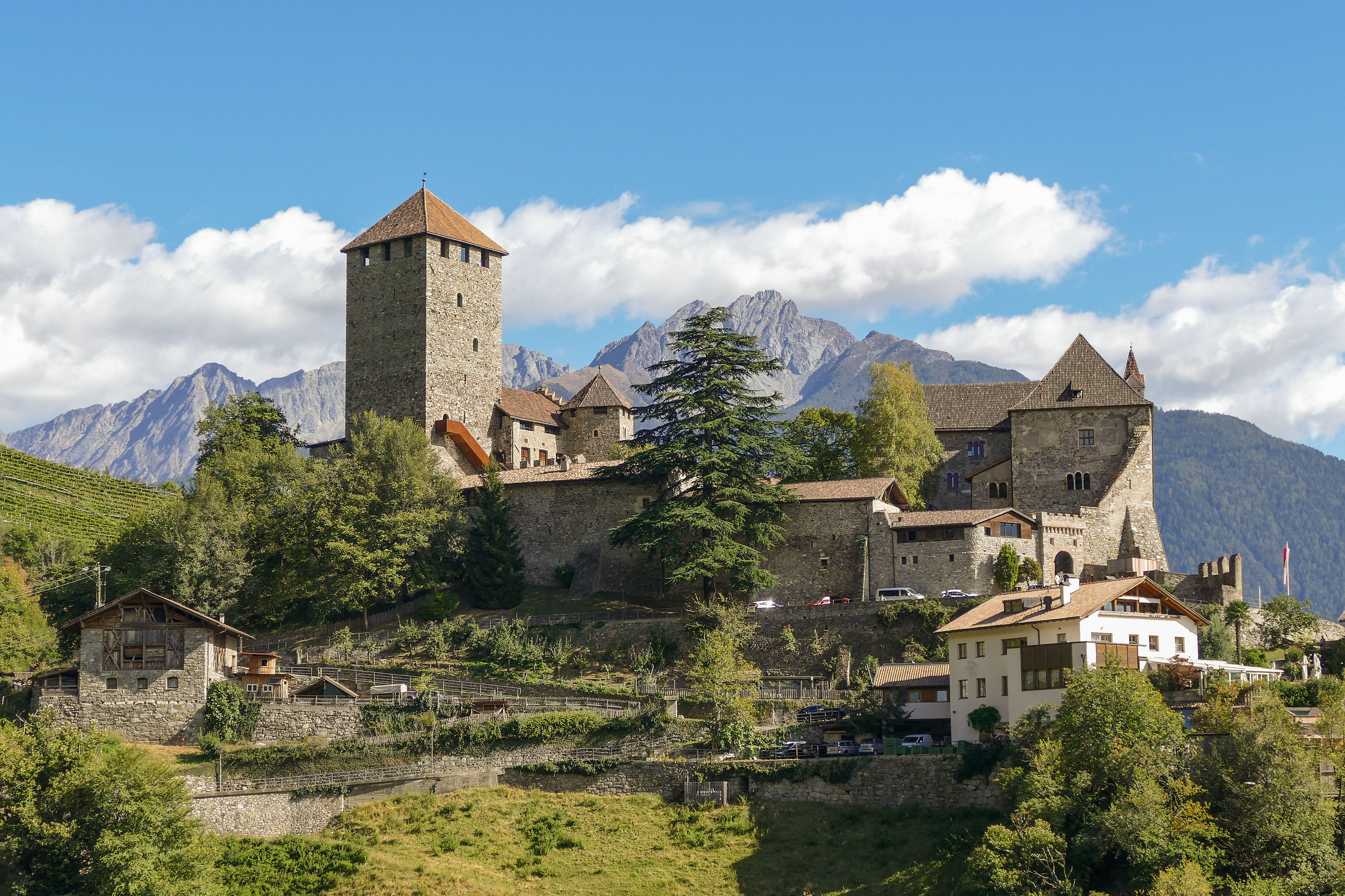 Schloss Tirol - der Postkartenblick